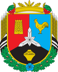 Герб Борщівського району